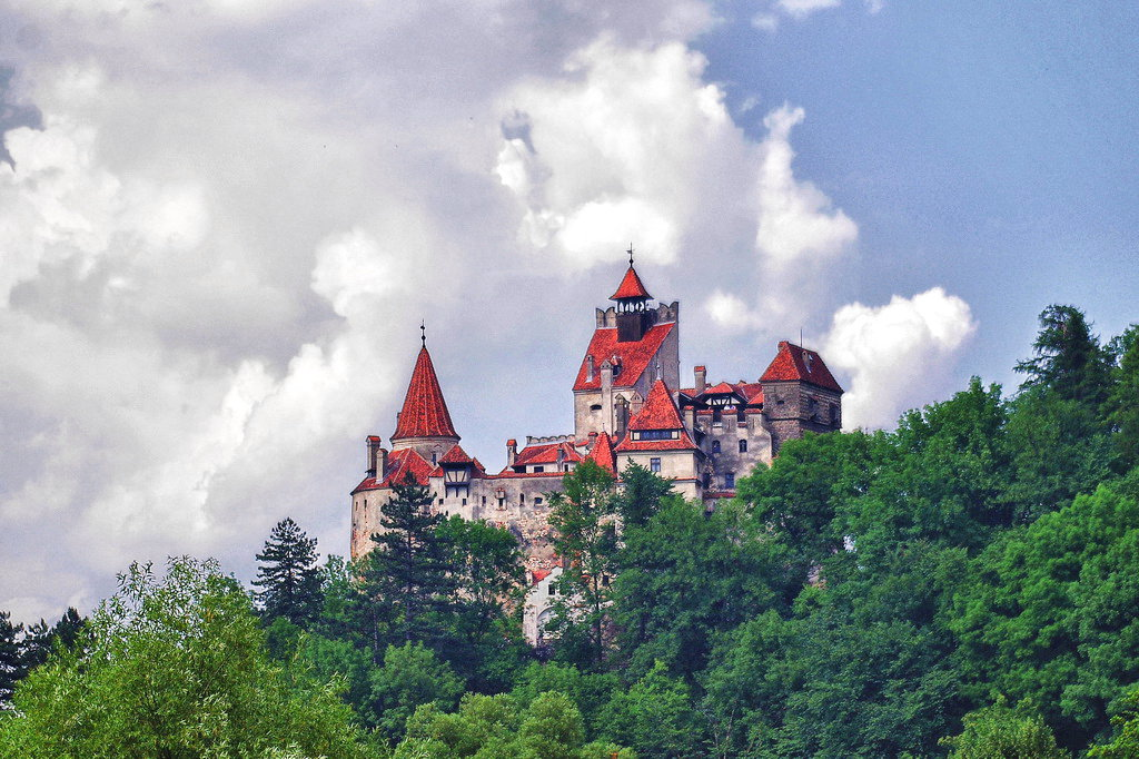 Castelul Bran, Brasov, Romania